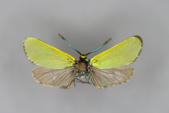 Adscita mannii, Männchen